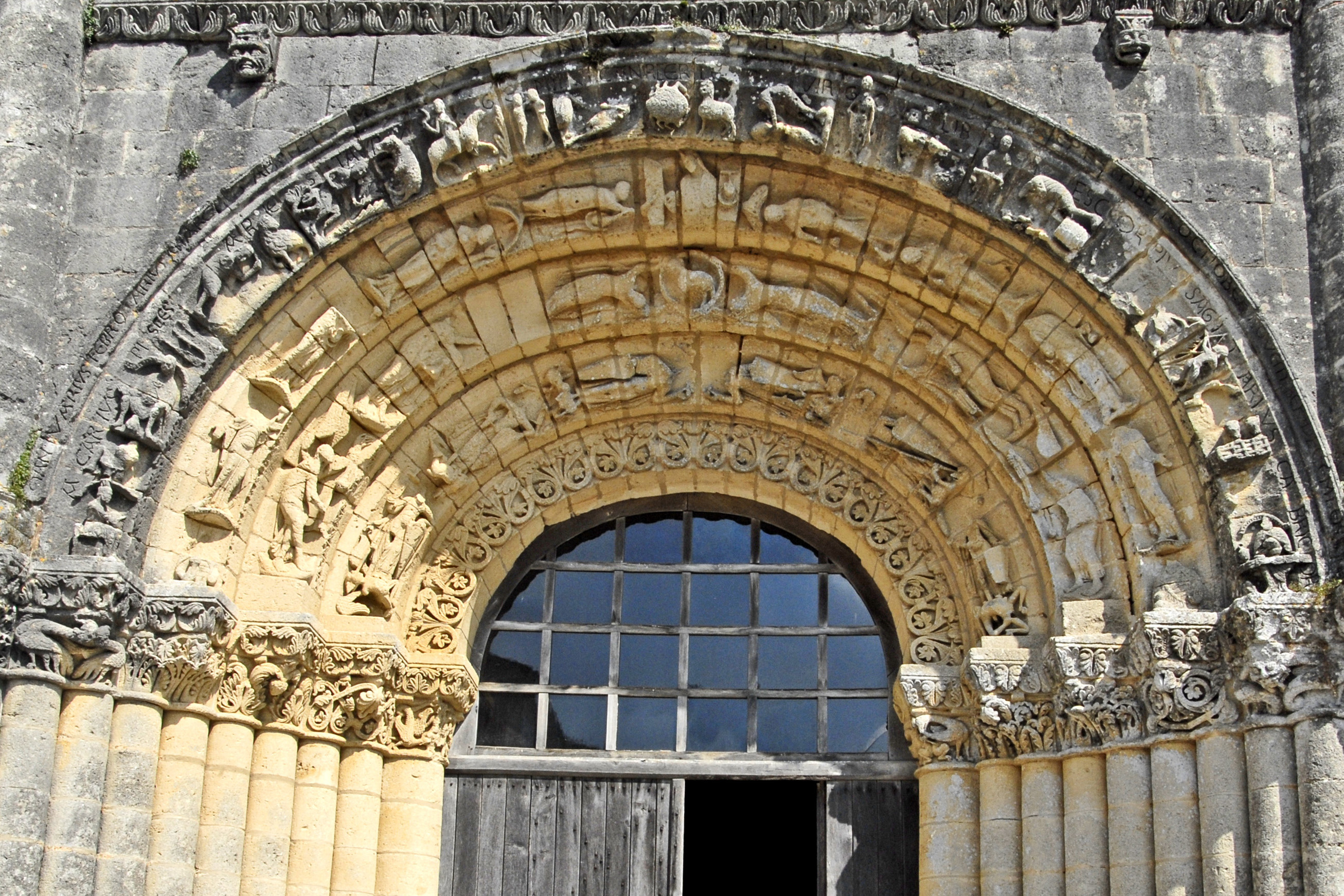 Fenioux, Fassade, Archivoltenbögen u. Kapitelle